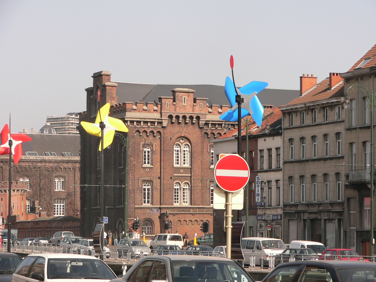 Auteur : Mario Scolas - licence libre pour tous les utilisateurs...